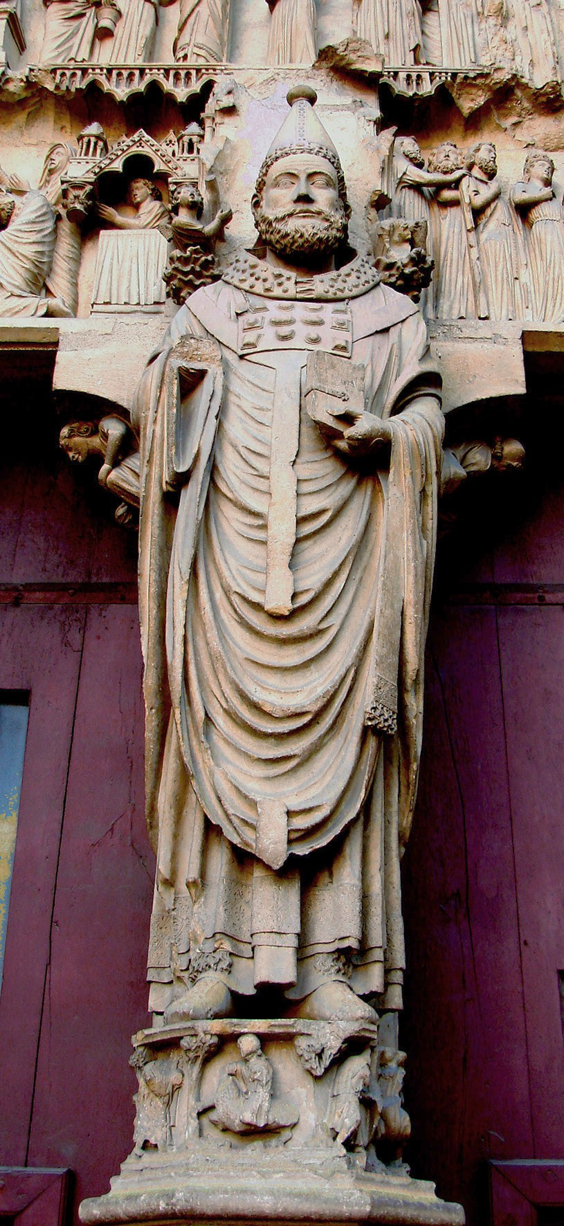 Statue du pape St Calixte au trumeau du portail central du transept Nord.